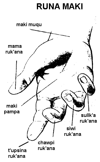 Runa Simi: runap makin